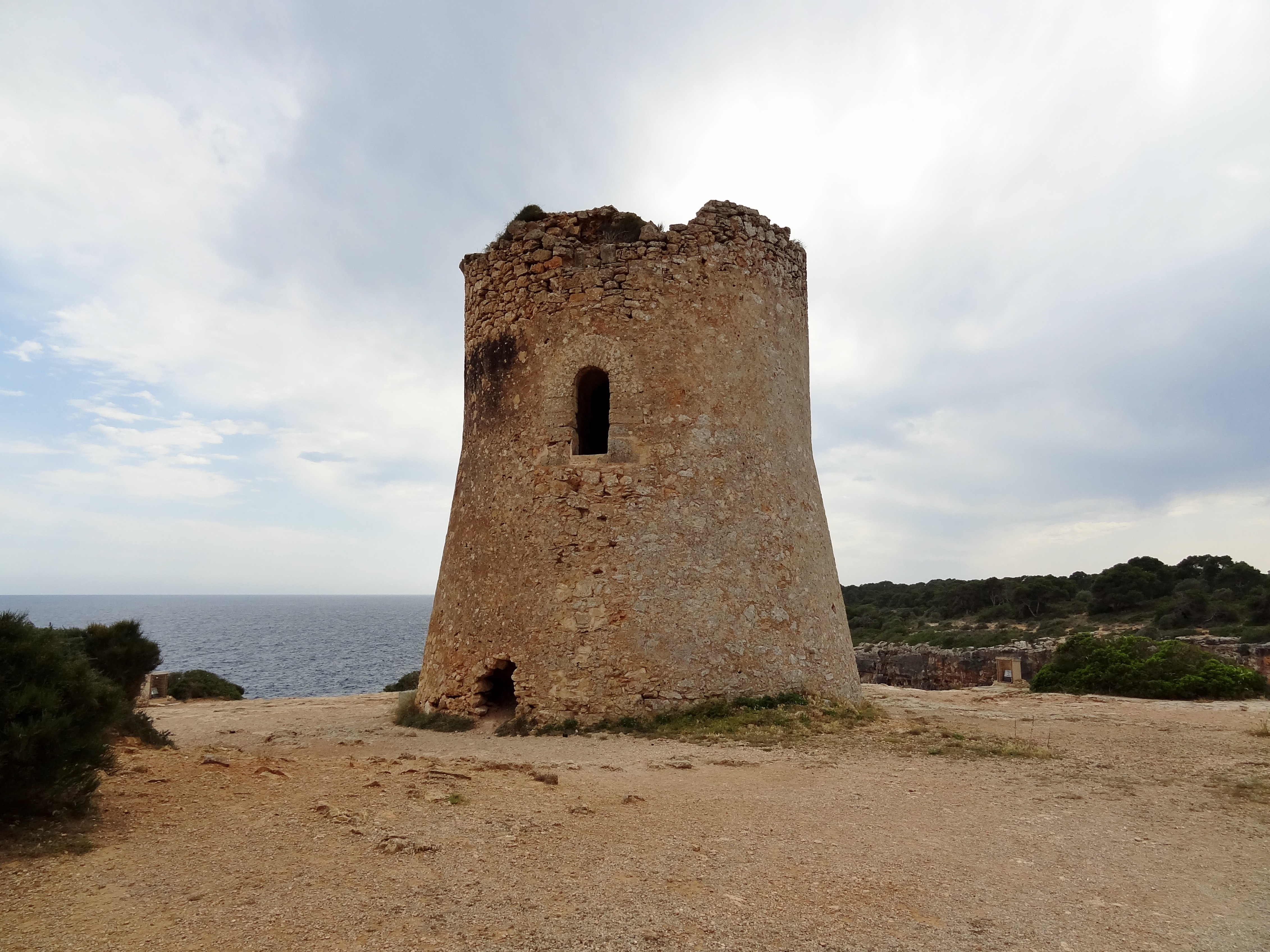 Torre de Vigia de Cala Pi (Wachturm von Cala Pi), erbaut 1543, Gemeinde Llucmajor, Mallorca, Spanien